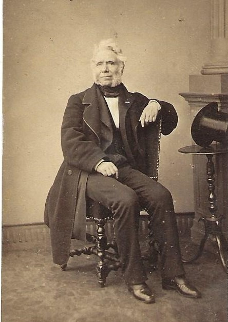 Jean Labordère circa 1770